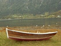 Ei kokse bygd av Jakob Halsnes, Solåsundet i bakgrunnen.